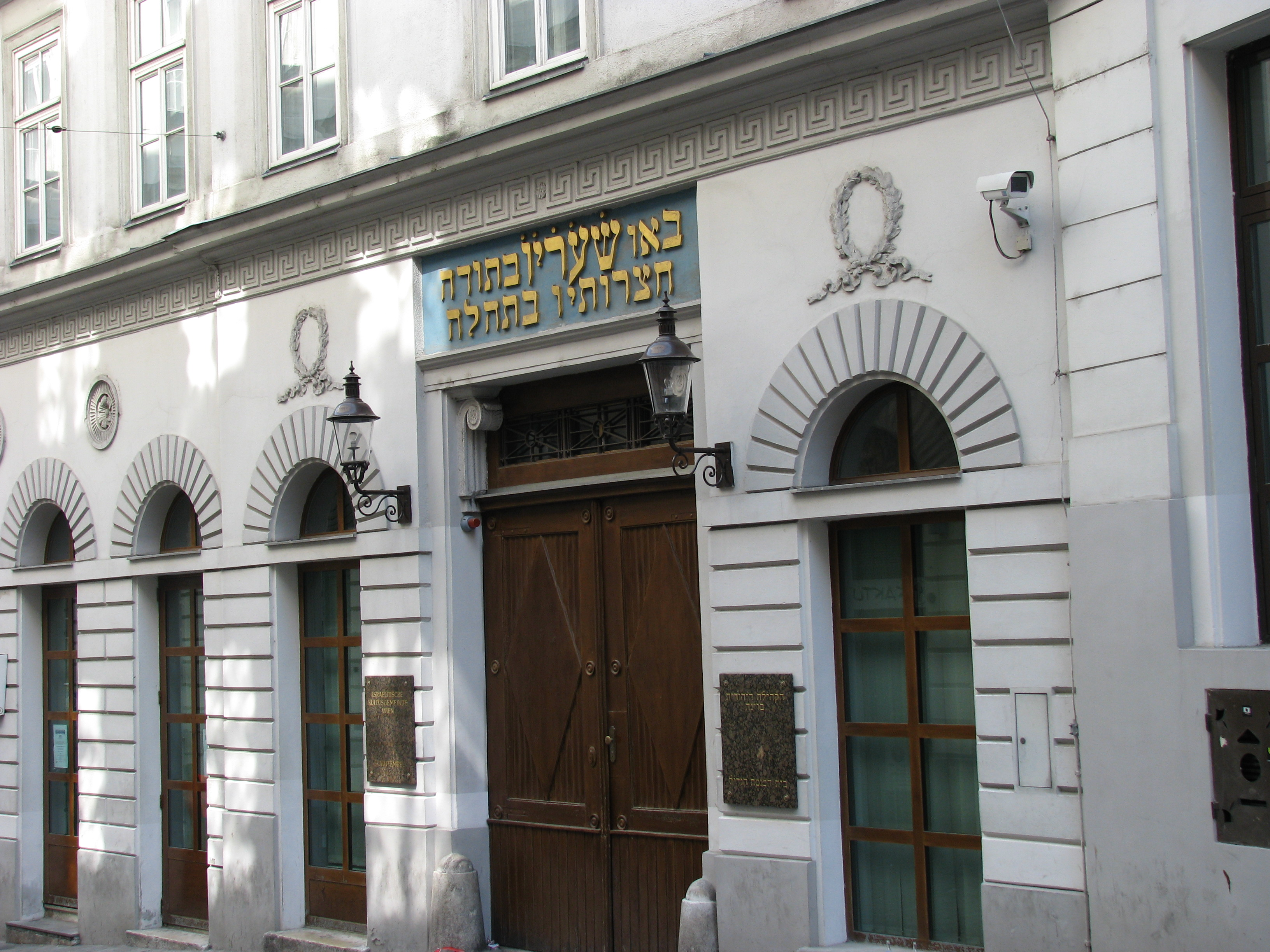 Synagoge (Wiener Stadttempel) und Haus der Israelitischen Kultusgemeinde